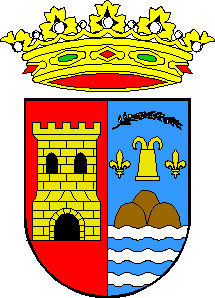 Escudo de Benferri, en Alicante (España)